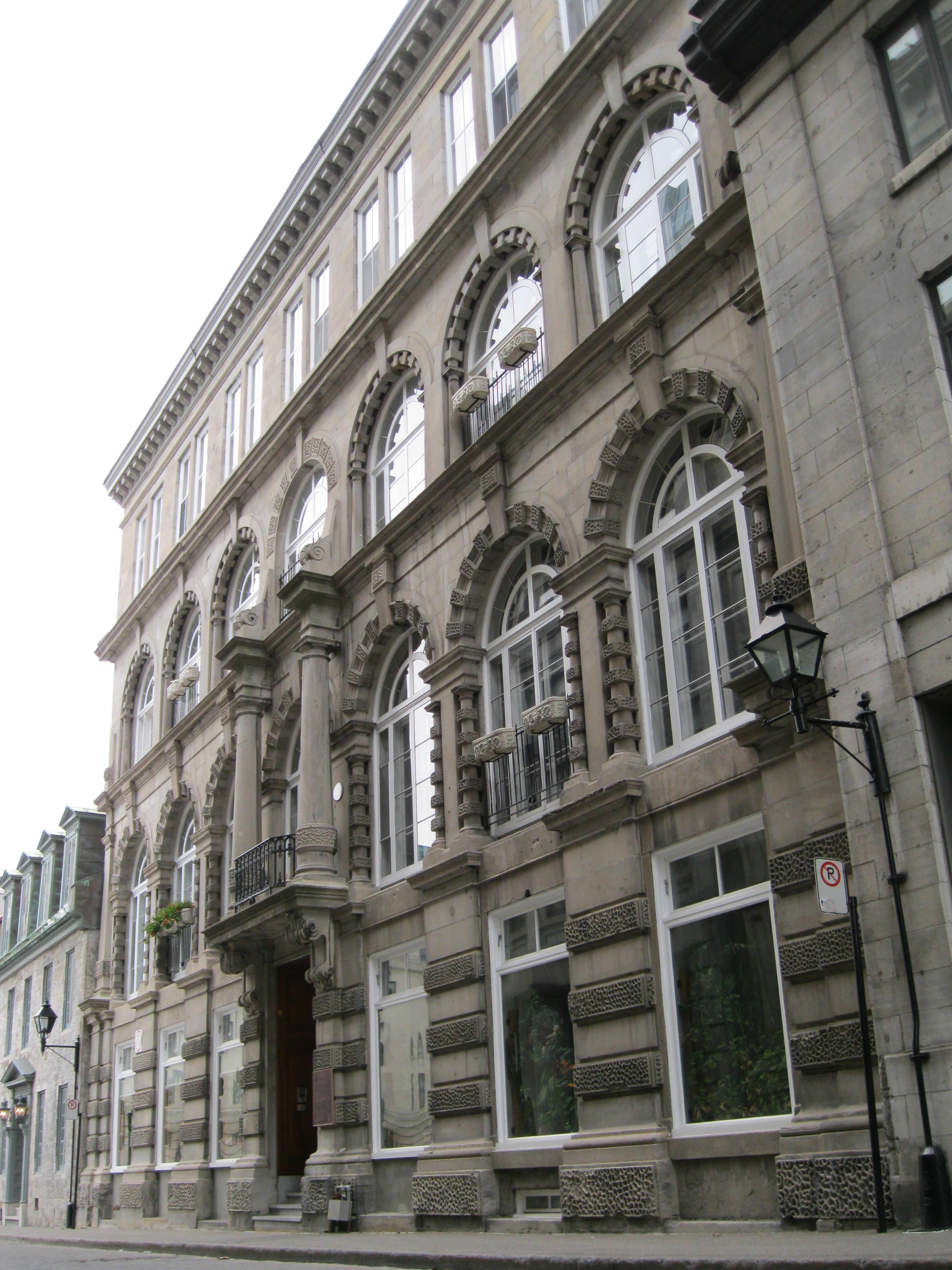 Édifice du Merchants' Exchange ou édifice Le Devoir, 211, rue du Saint-Sacrement, Montréal Vieux-Montréal